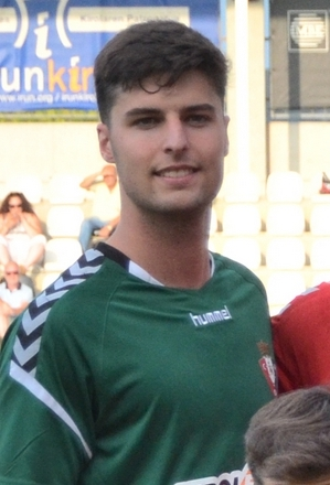 CSC_0149